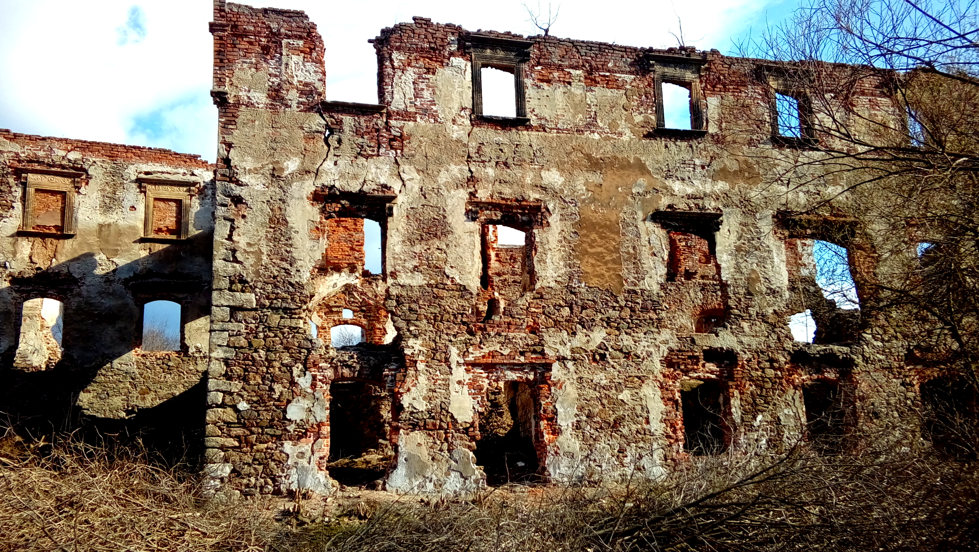 Zamek Grodztwo w Kamiennej Górze